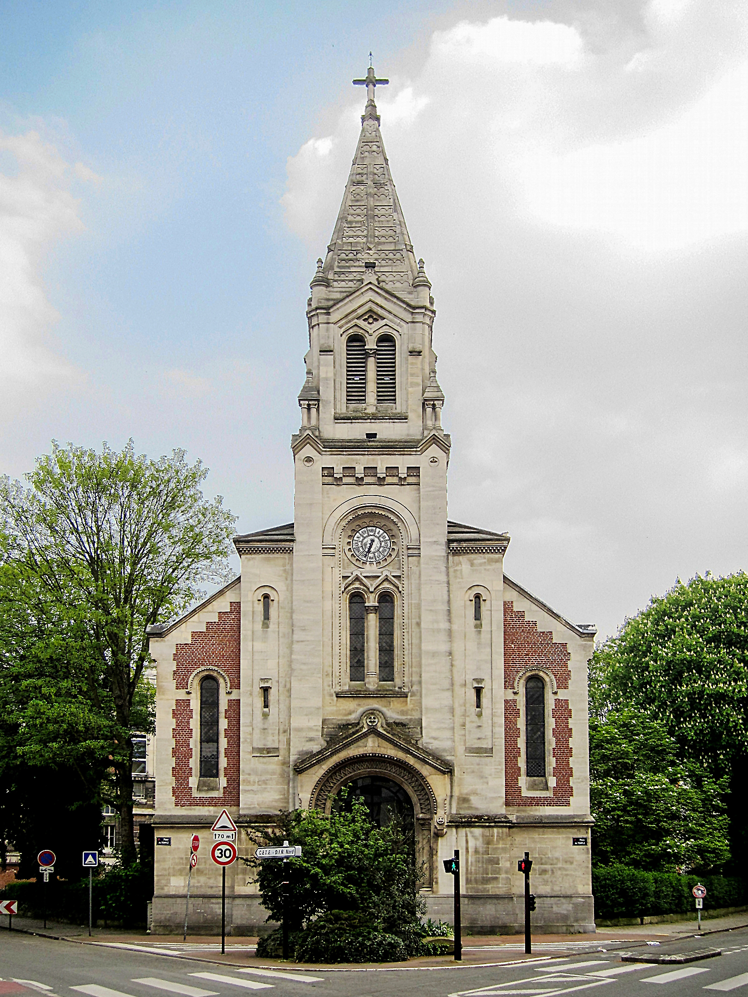 Le temple de l'église protestante unie de France à Lille (Nord).